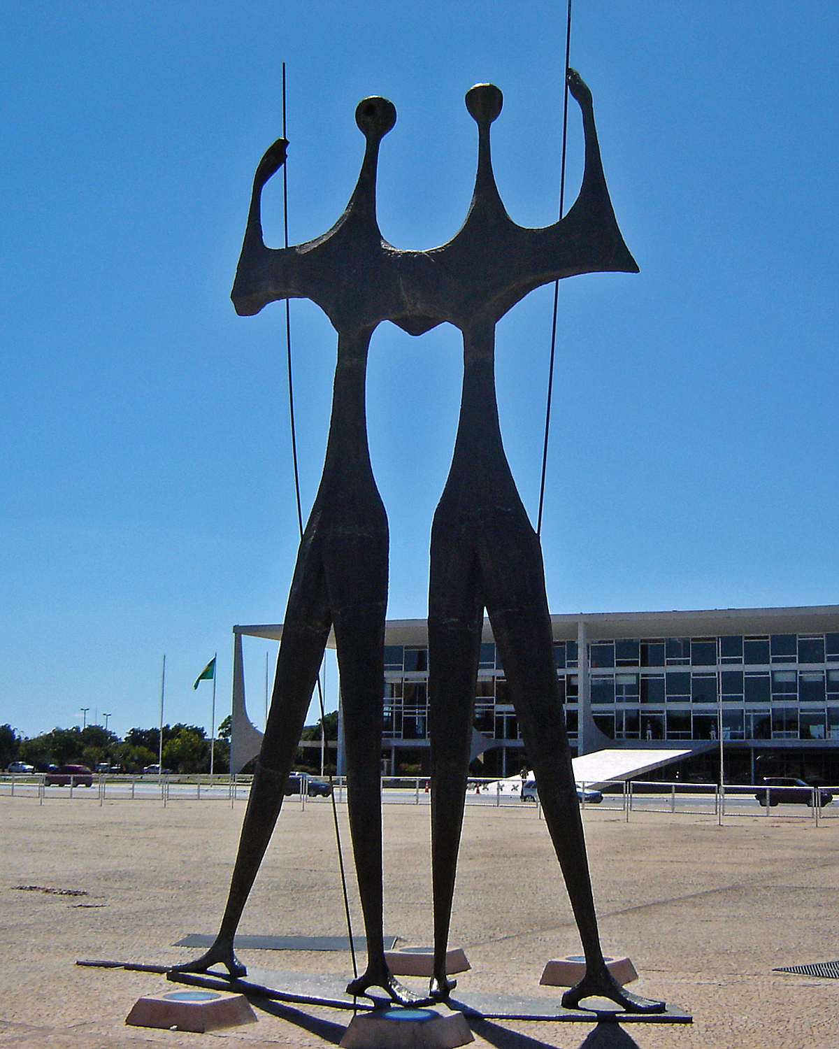 Escultura "Os Guerreiros" (aka "Os Candangos"), Praça dos Três Poderes, Brasilia, DF, Brasil. O Palácio do Planalto no segundo plano.